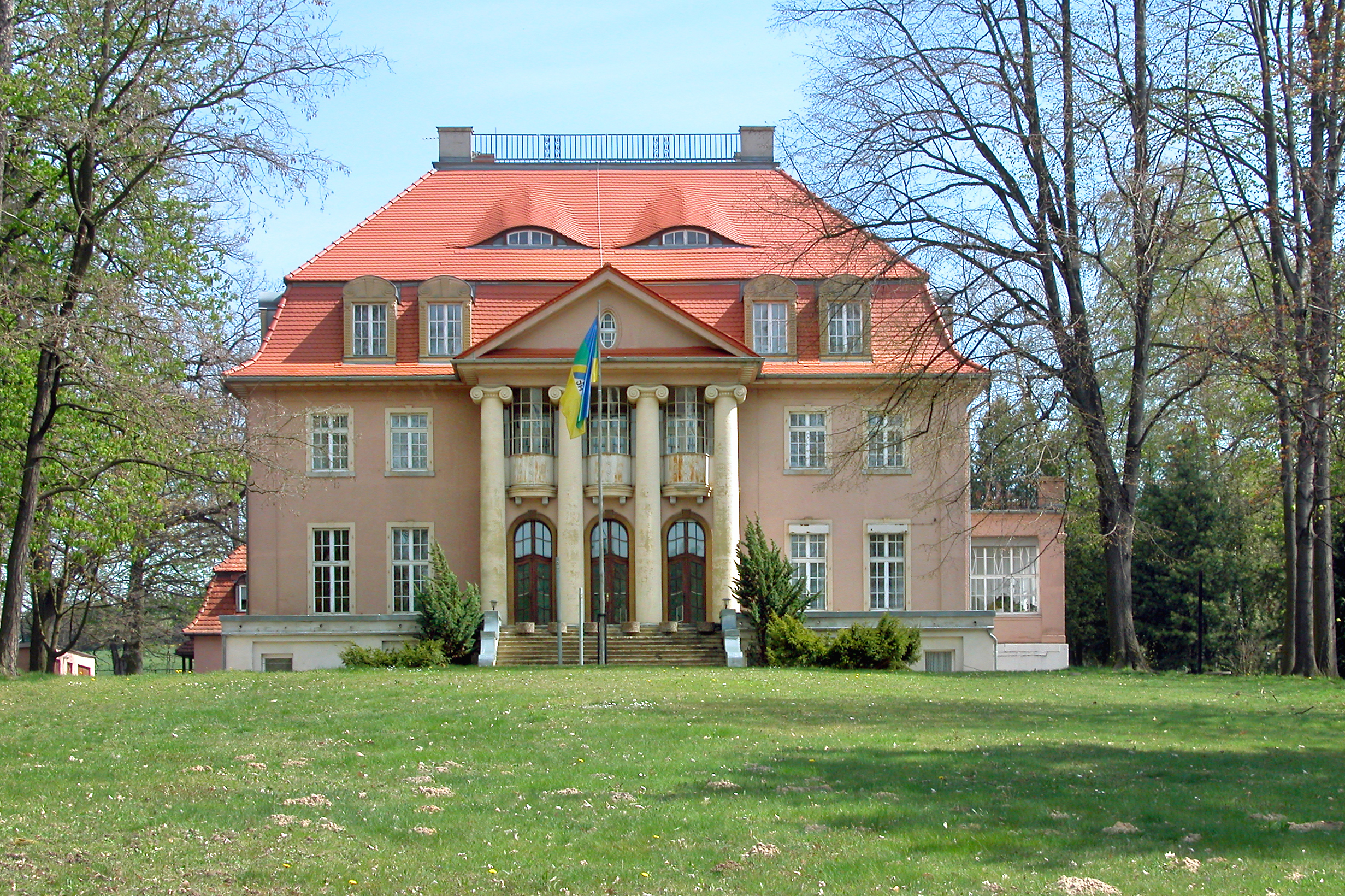 28.04.2008 02791 Oberoderwitz (Oderwitz), Zur Lindenallee 5: Schloß Oberoderwitz, erbaut 1909 bis 1911 unter Maximilian von Beschwitz. Bis 2012 Jugendherberge, danach Privatbesitz. (GMP: 50.968413,14.716150). Sicht von Westen. [DSCN32503.TIF]20080428365DR.JPG(c)Blobelt